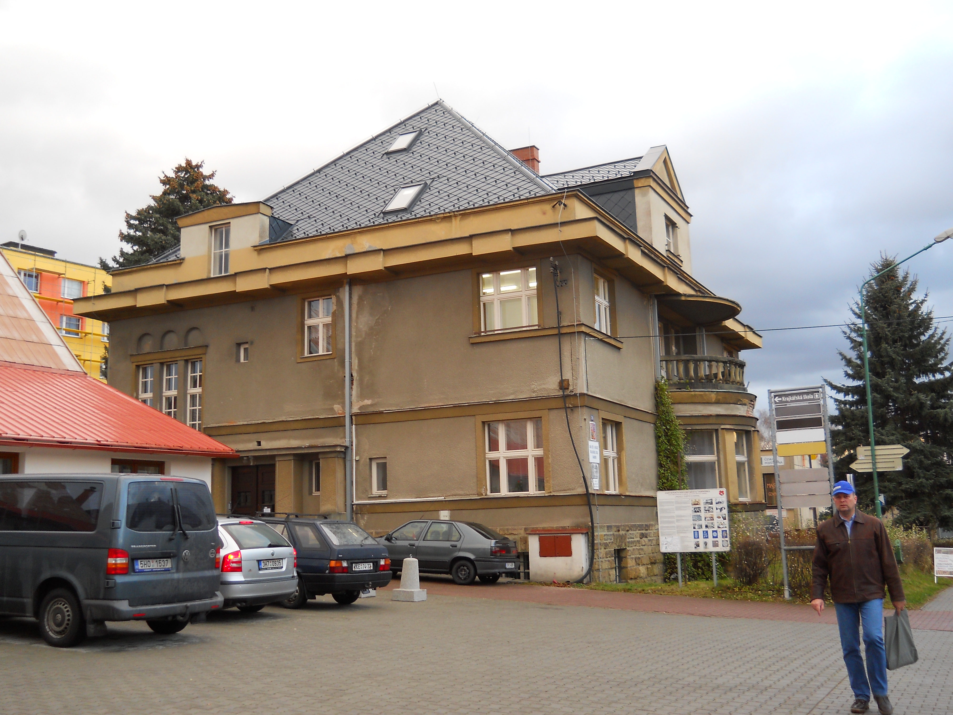 Kubiasova vila, Tyršova 25, Vamberk.